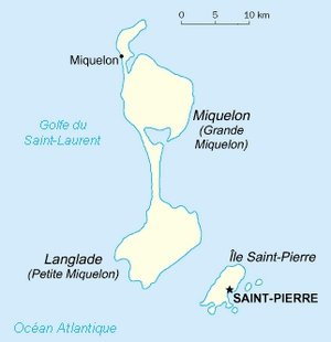 Carte de l'île française Saint-Pierre-et-Miquelon